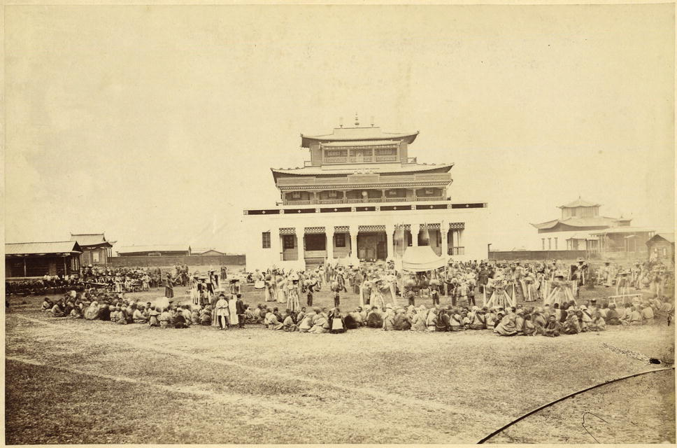 Церемония Цам в Гусиноозёрском дацане